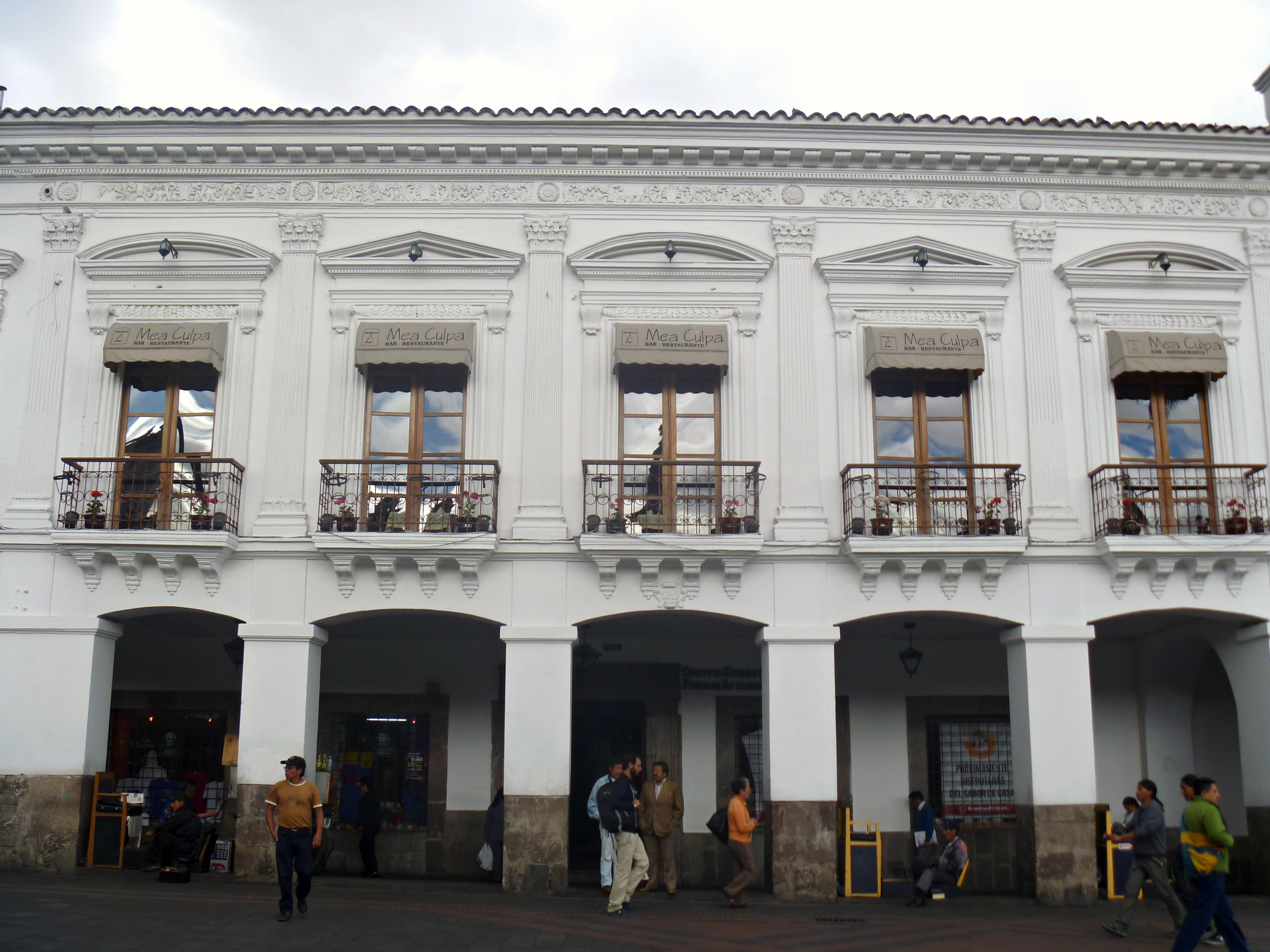 Fachada del Palacio de la Curia Metropolitana, actual Centro Comercial Pasaje Arzobispal. Quito, Ecuador.